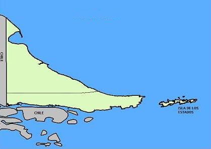 Mappa dei due dipartimenti argentini della Terra del Fuoco.